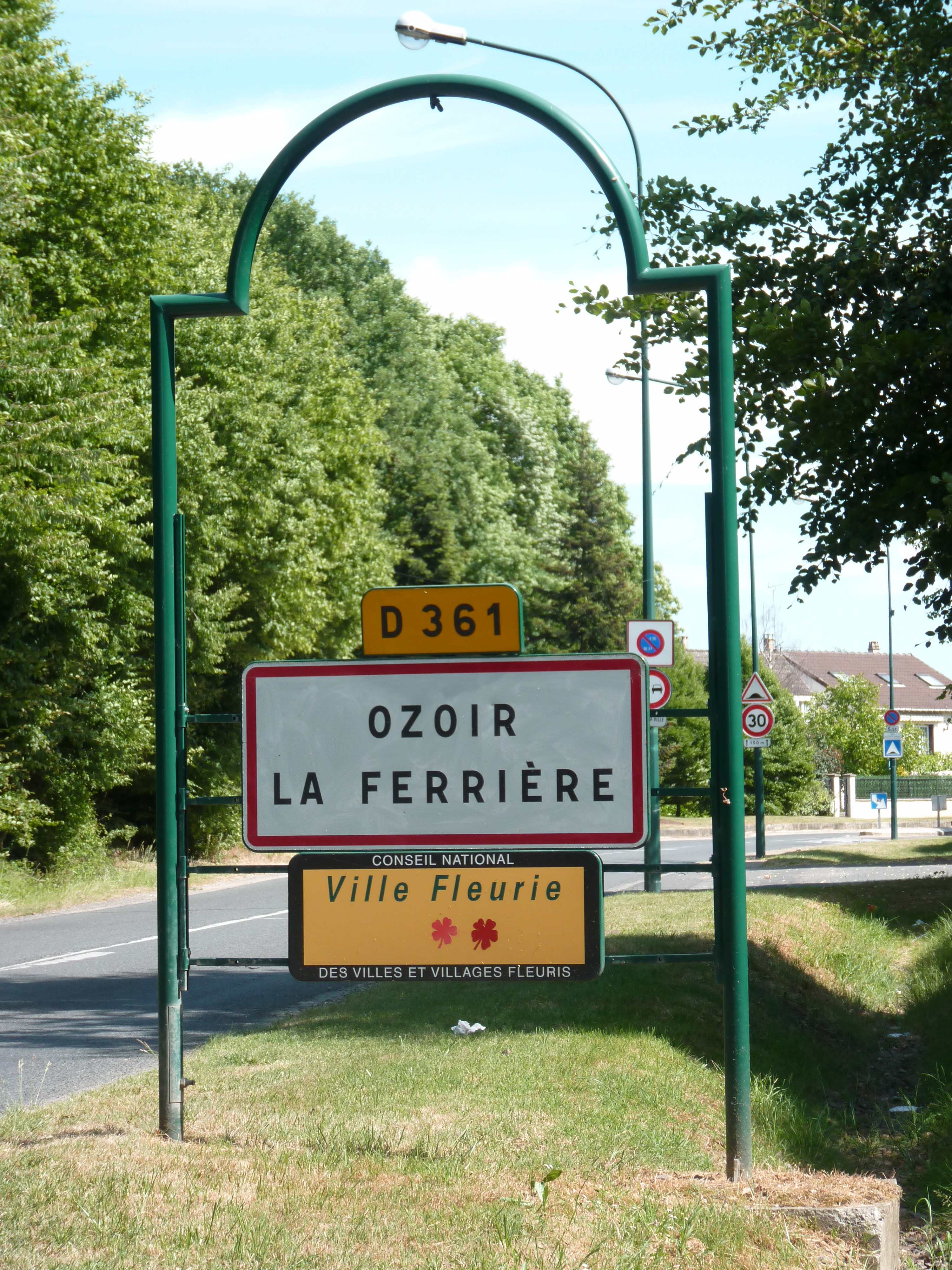 Panneau d'entrée d'Ozoir-la-Ferrière.